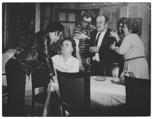 Escena en un restaurante, en la película Mi novia el... [travesti] (1975). De izquierda a derecha: Alberto Olmedo de pie, junto a Menchu Quesada, sentada. Adolfo Linvel, Cacho Espíndola y dos actrices de pie detrás de una mesa.